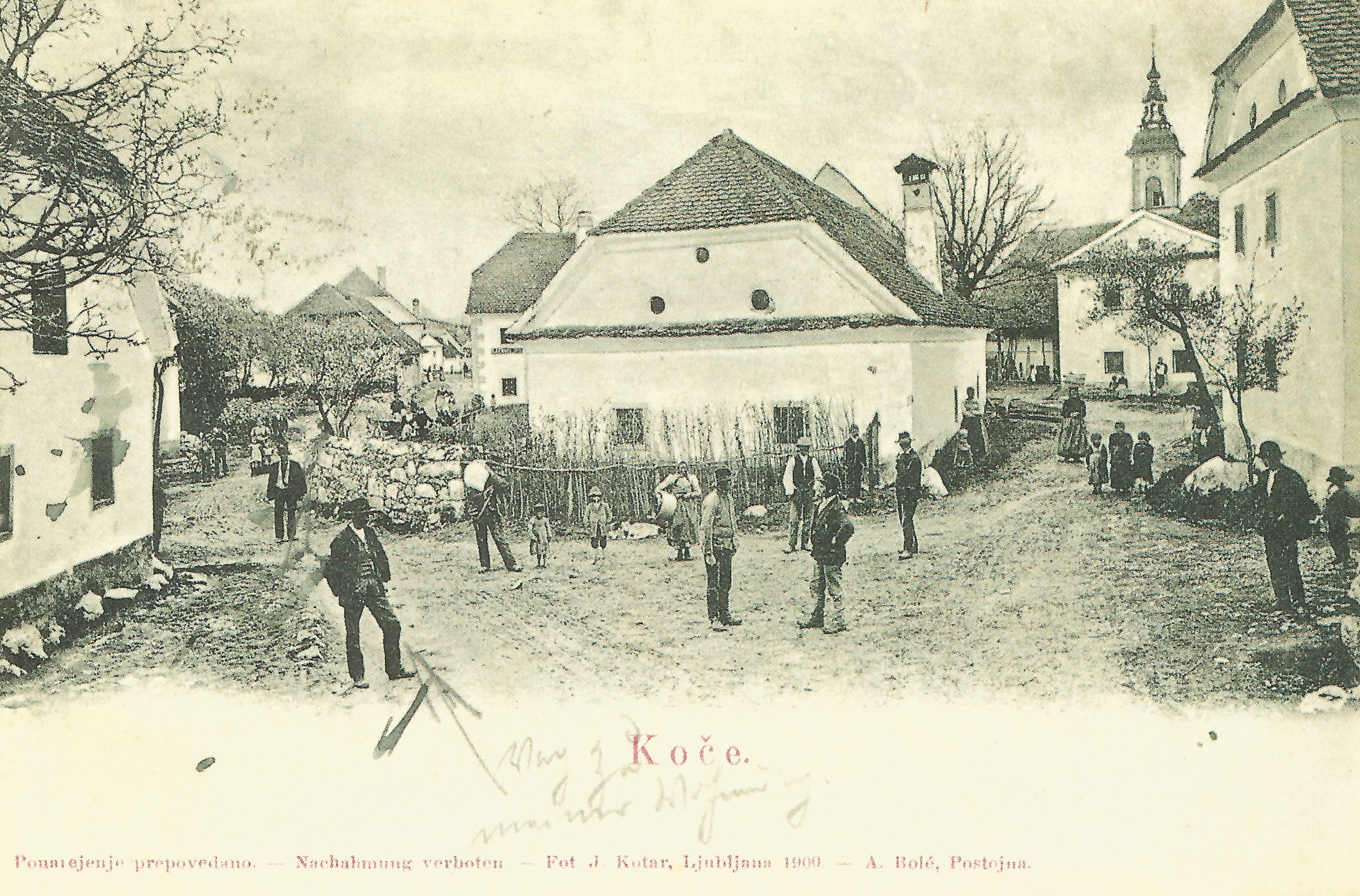 Razglednica Koč.